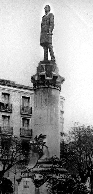 Instantánea tomada en 1916 de la estatua a Práxedes Mateo Sagasta de Logroño en su primera ubicacion frente al instituto que lleva su nombre.